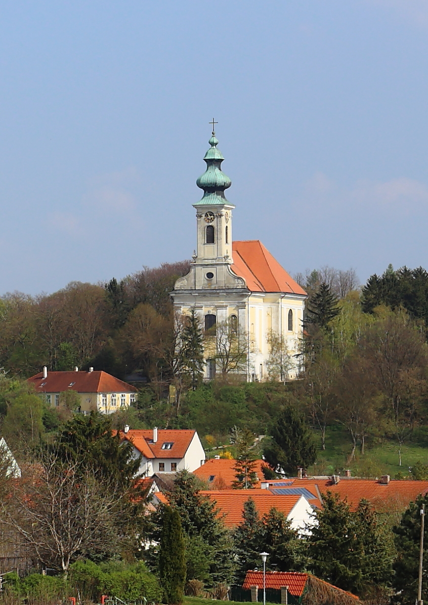 Die katholische Pfarrkirche hl. Nikolaus in Wolfpassing an der Hochleithen, ein Ortsteil der niederösterreichischen Gemeinde Hochleithen. Ein mächtiger barocker Bau, der auf einer Erhebung östlich des Ortes 1744 errichtet wurde und weithin sichtbar ist.